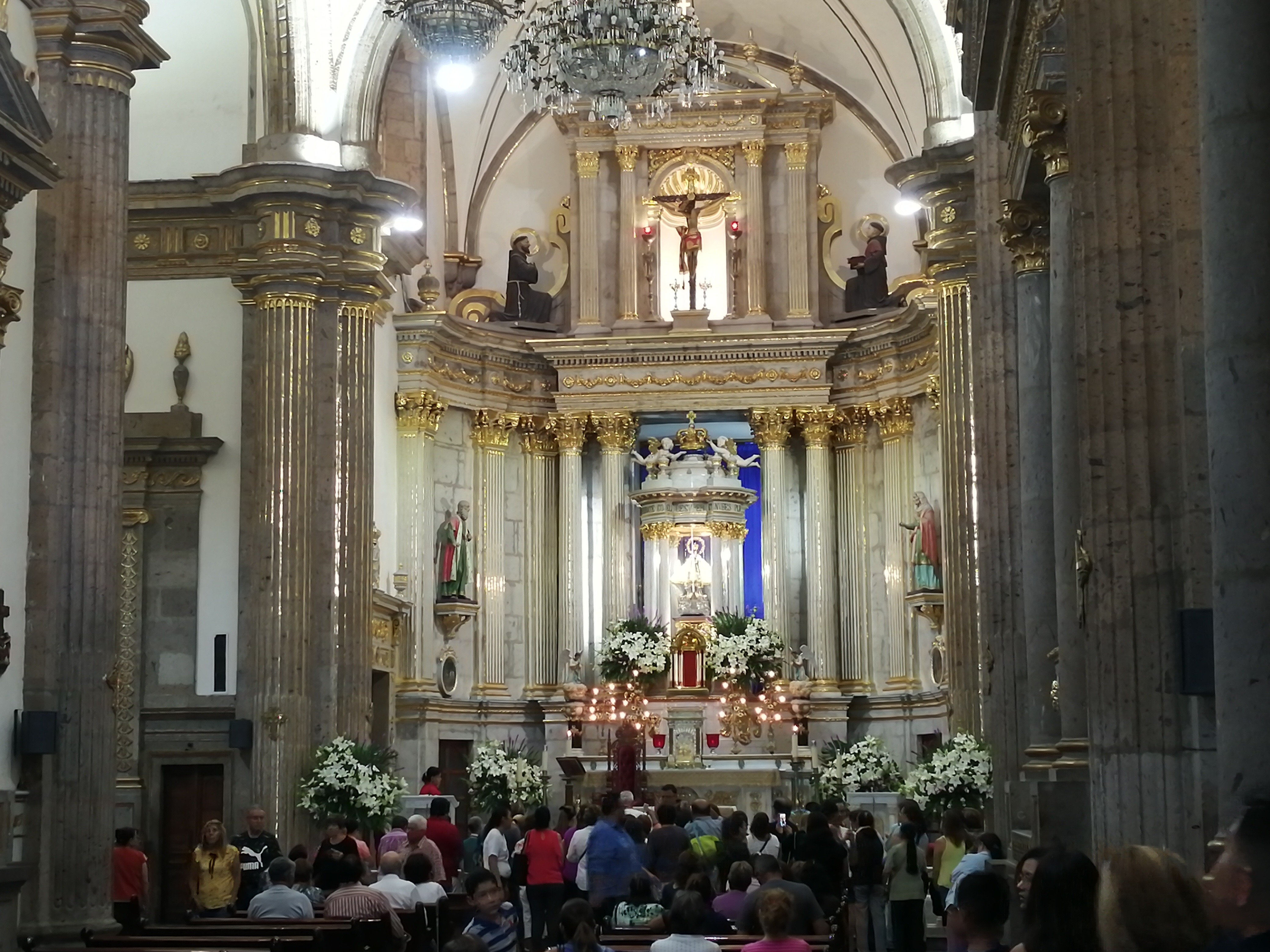 basilica de zapopan en interior 2019